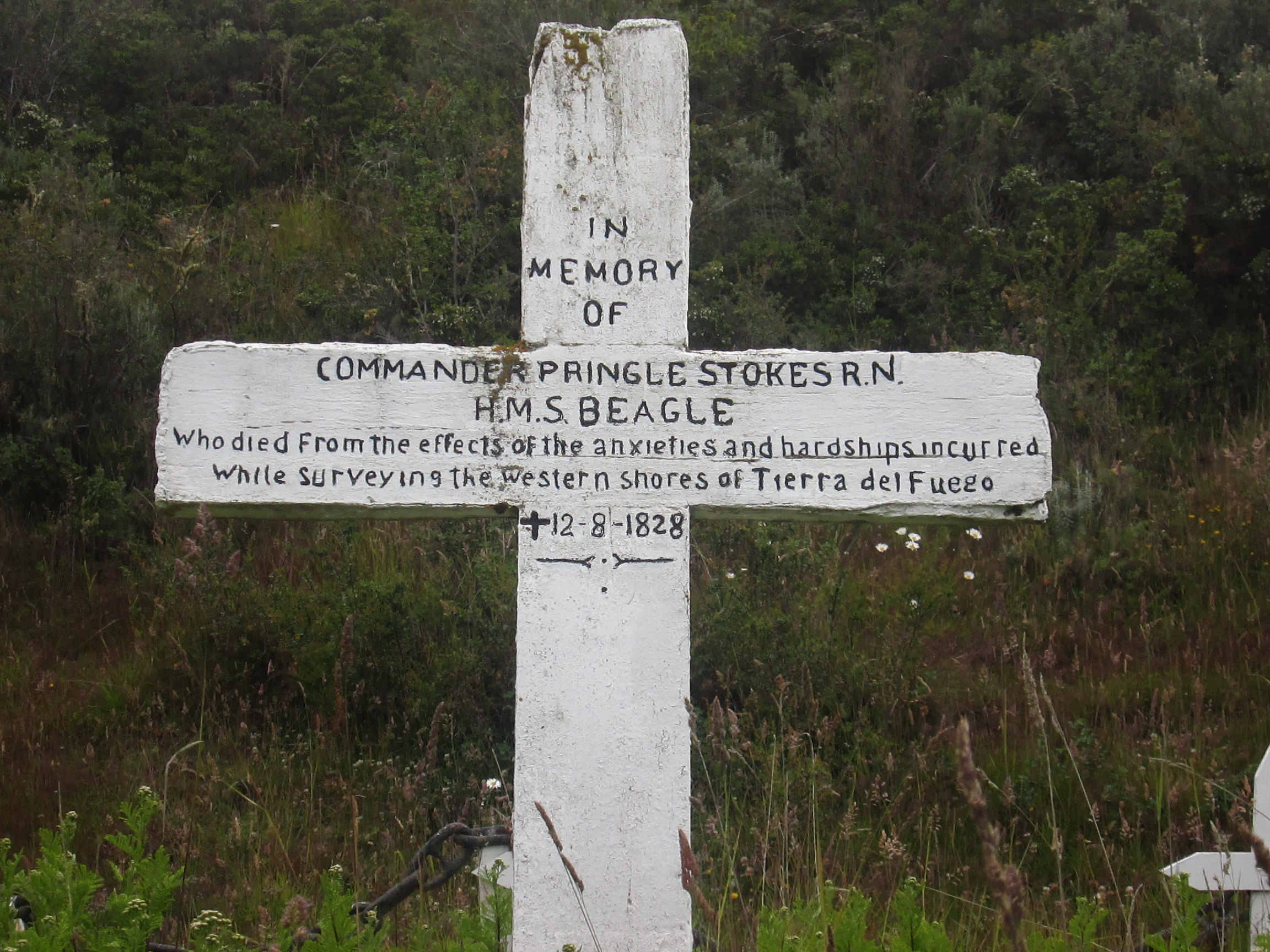 Cruz en homenaje al oficial de la marina Británica Pringle Stokes, el cual se suicidó durante uno de los viajes del HMS Beagle, específicamente en Puerto del Hambre, Región de Magallanes, Chile.